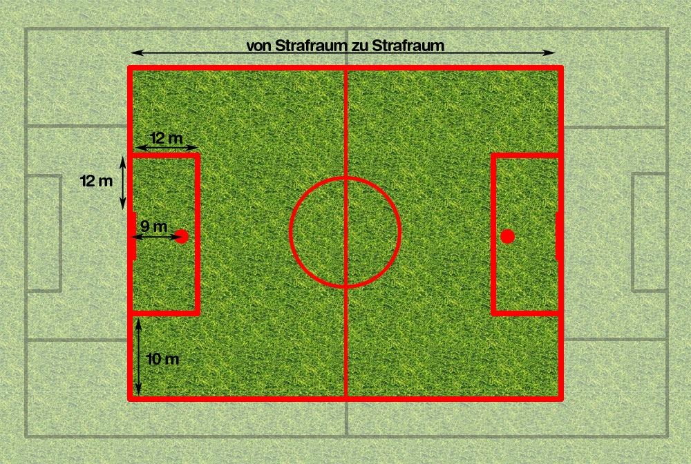 Das Spielfeld des „9 gegen 9“-Modells in der D-Jugend (U12/U13) des deutschen Fußballs. (verkleinertes Großfeld)